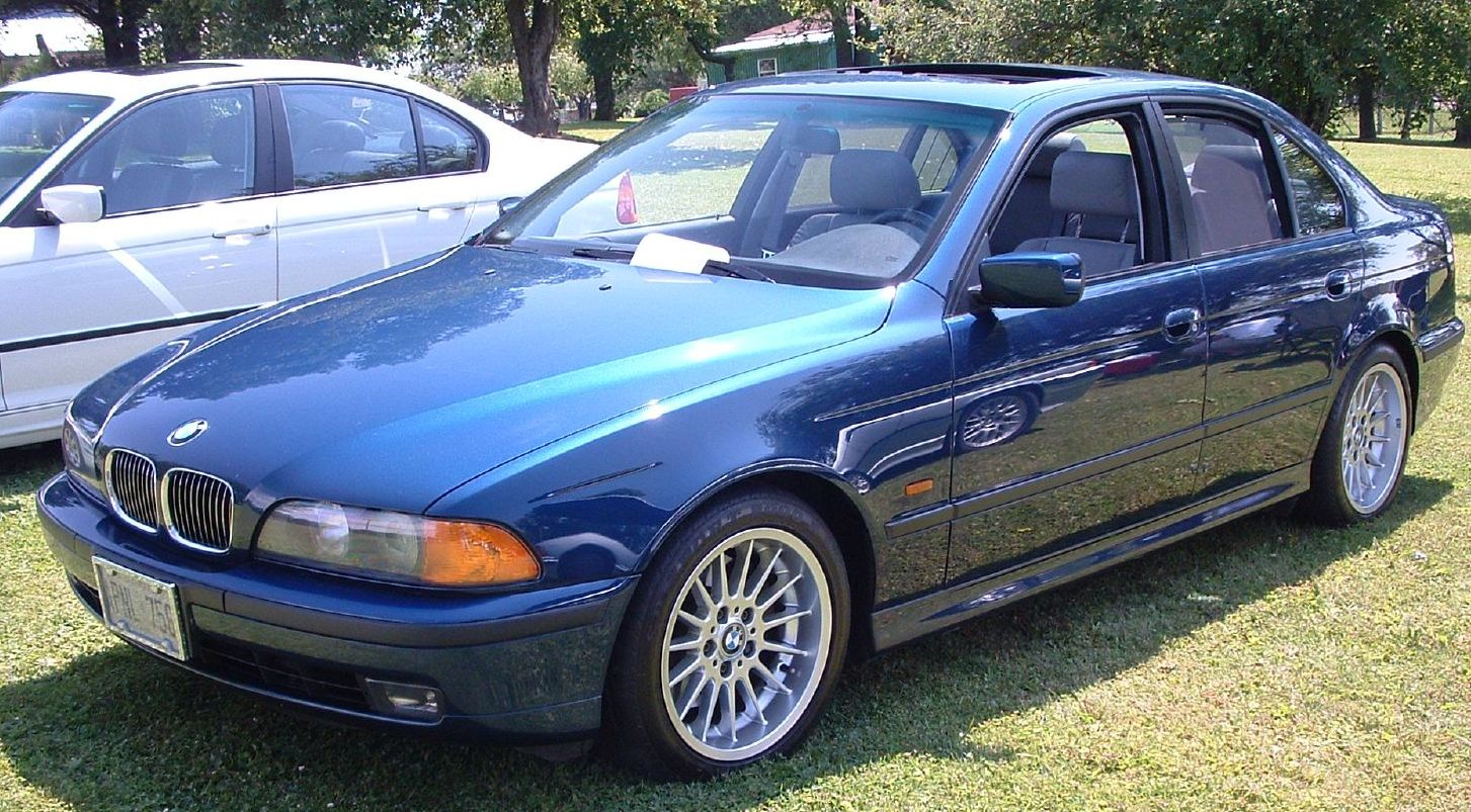 2000 BMW E39 540i sedan.